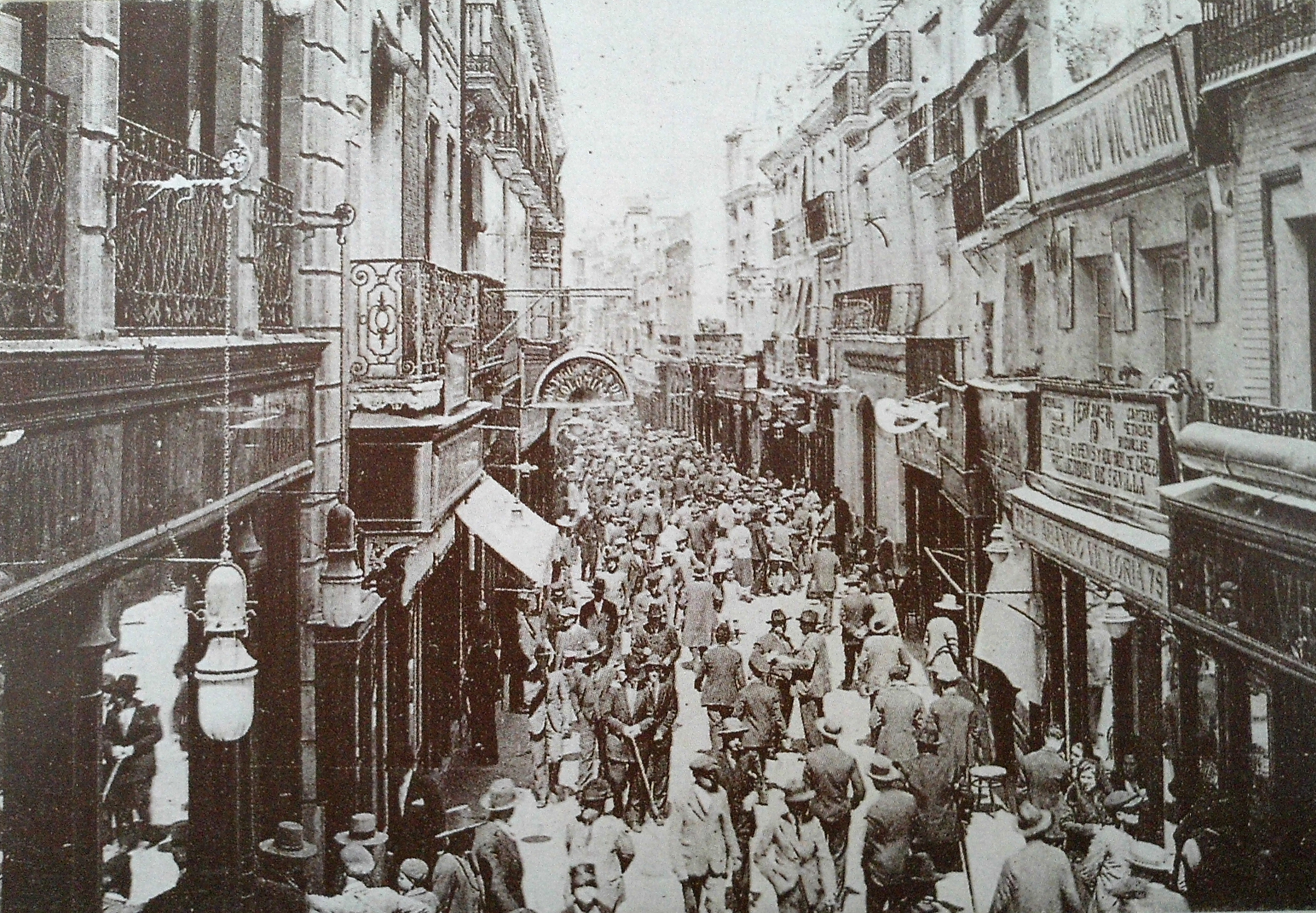 Calle Sierpes. Sevilla. Andalucía, España.